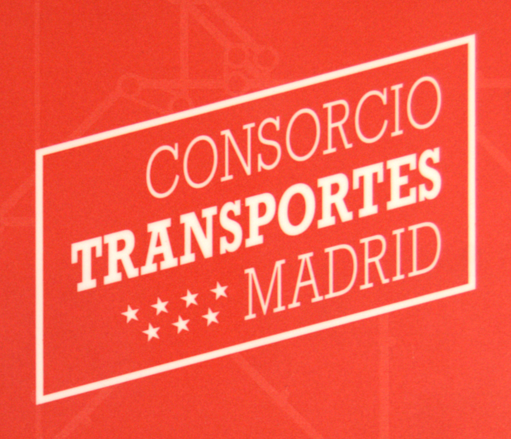 Fotografía del logotipo del Consorcio de Transportes de la Comunidad de Madrid (España).[1]